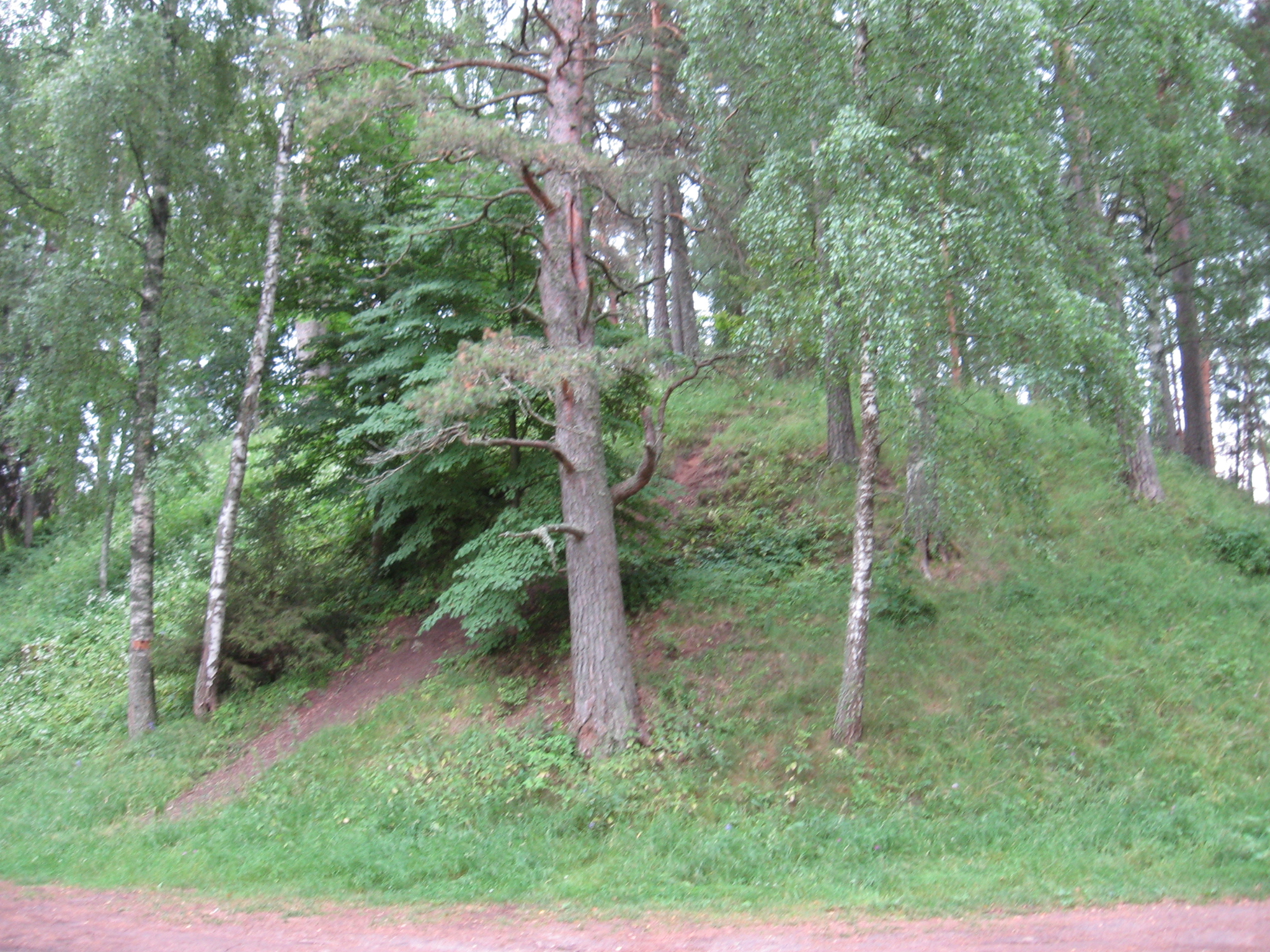 Vooremägi